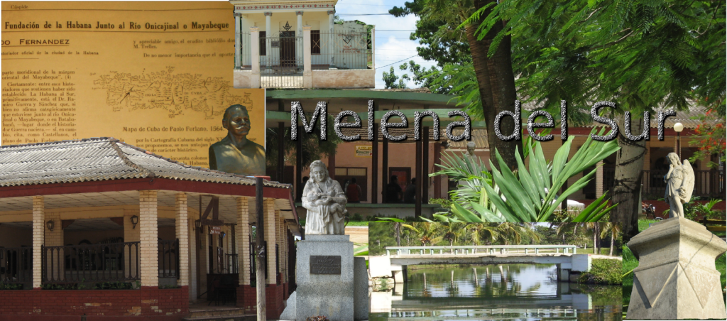 Conjunto de detalles que destacan diferentes lugares de Melena del Sur